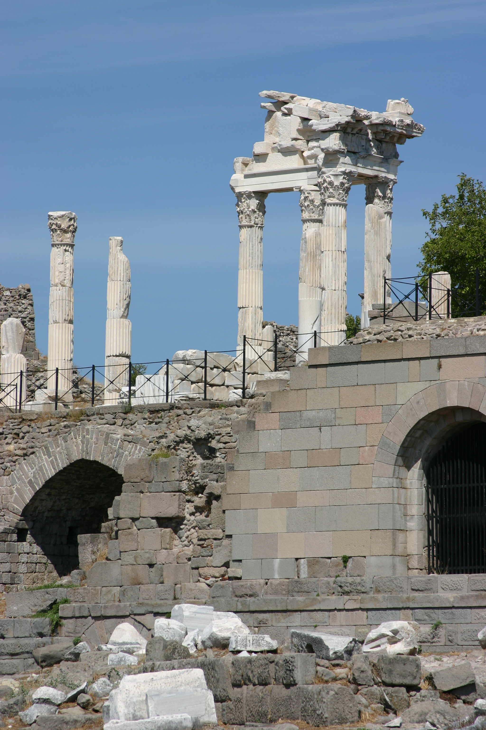 Templo de Trajano